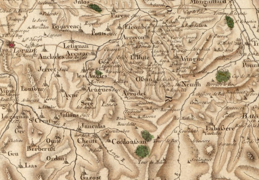 Extrait de la carte de Cassini (Collection « Hauslab-Liechtenstein ») correspondant au territoire du canton de Lourdes-Est et à l'ouest de celui de Bagnères de Bigorre..